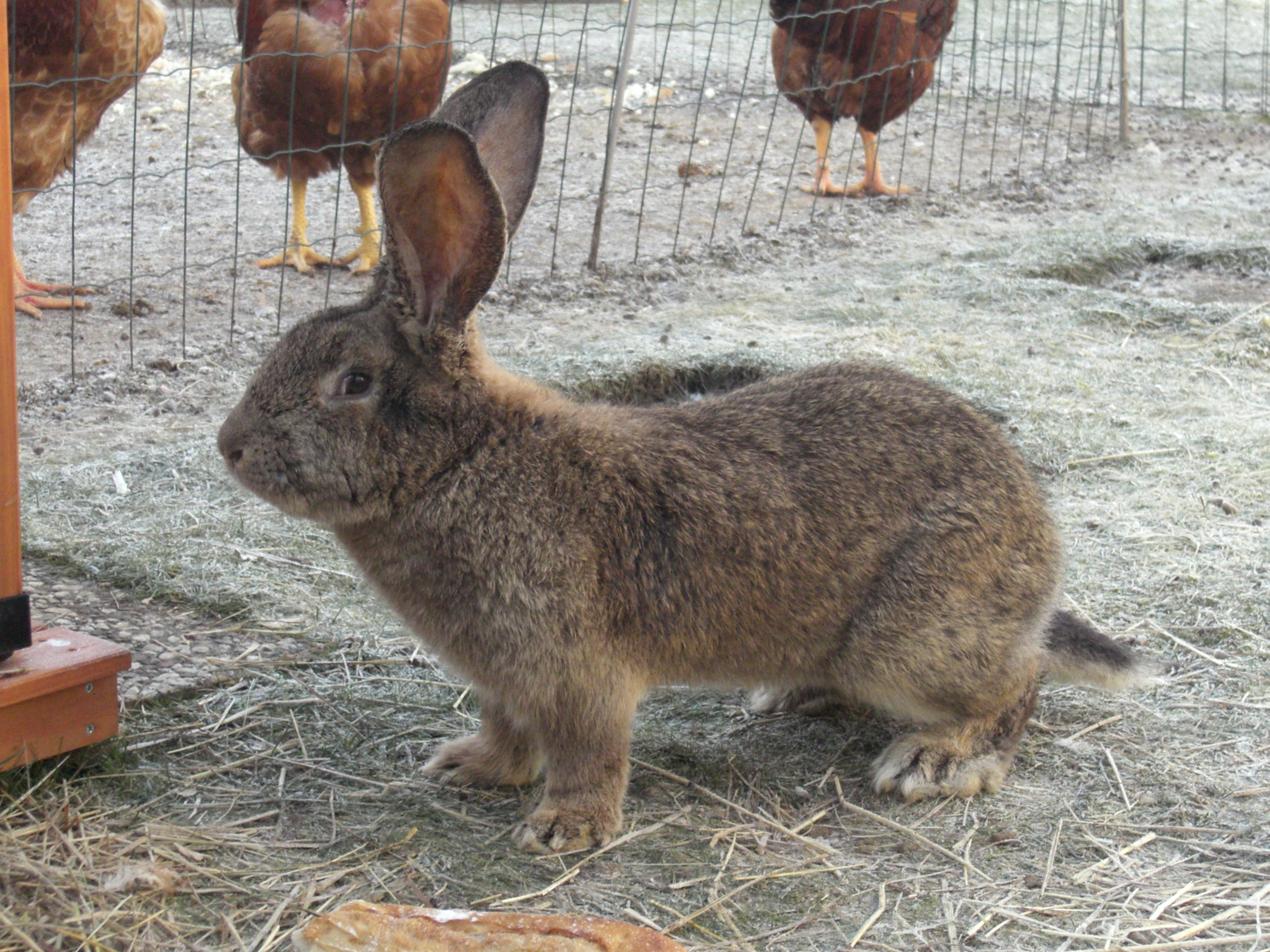 Lapin_geant_des_flandres.JPG